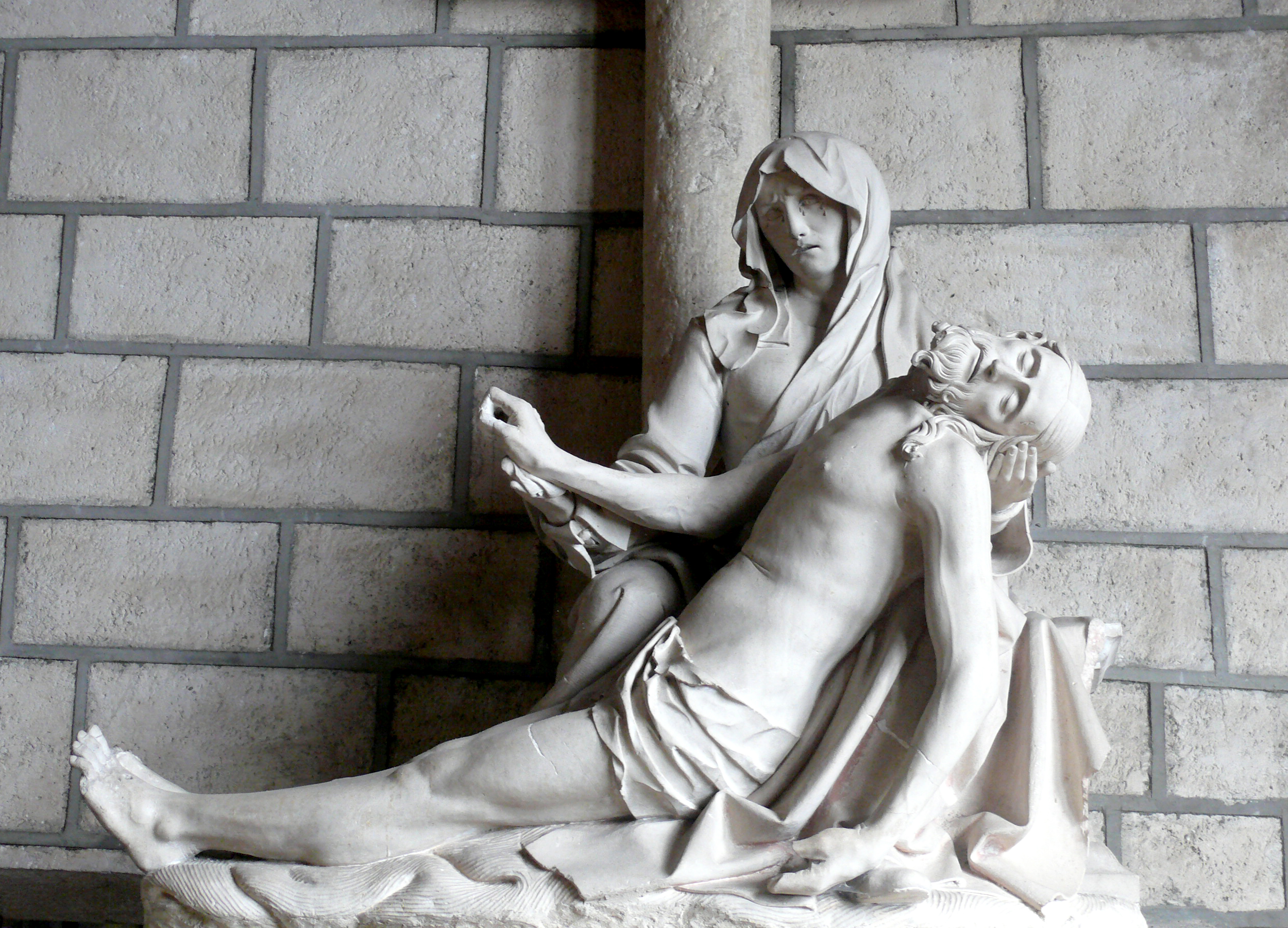 Vierge de Pitié (Marnay)